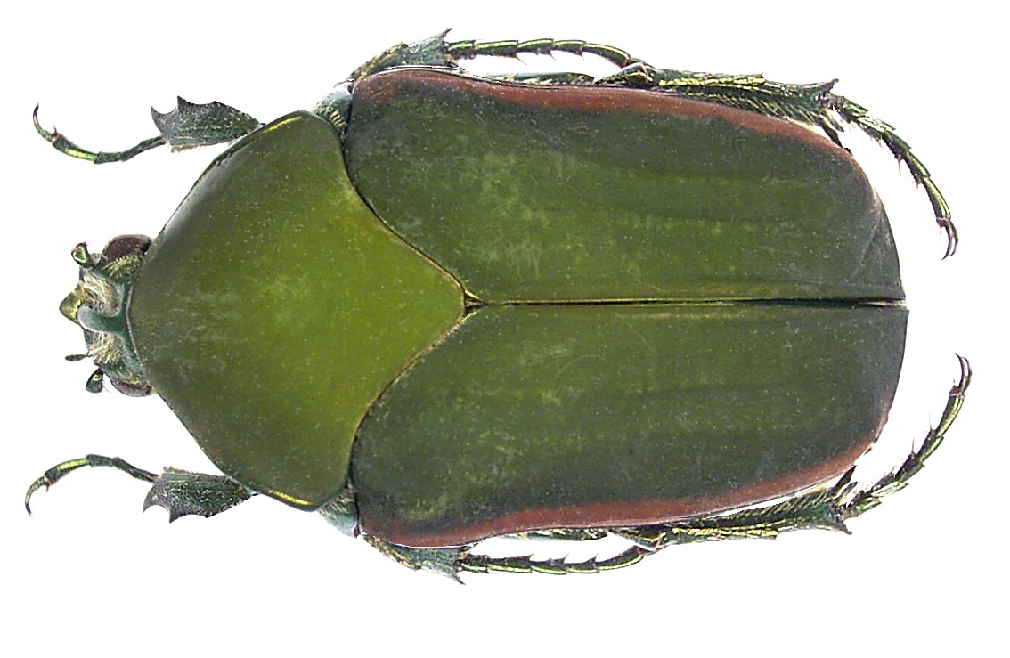 Familie: Scarabaeidae Grösse: 24 mm Fundort: Brasilien, 1952 det. U.Schmidt Foto: U.Schmidt, 2005